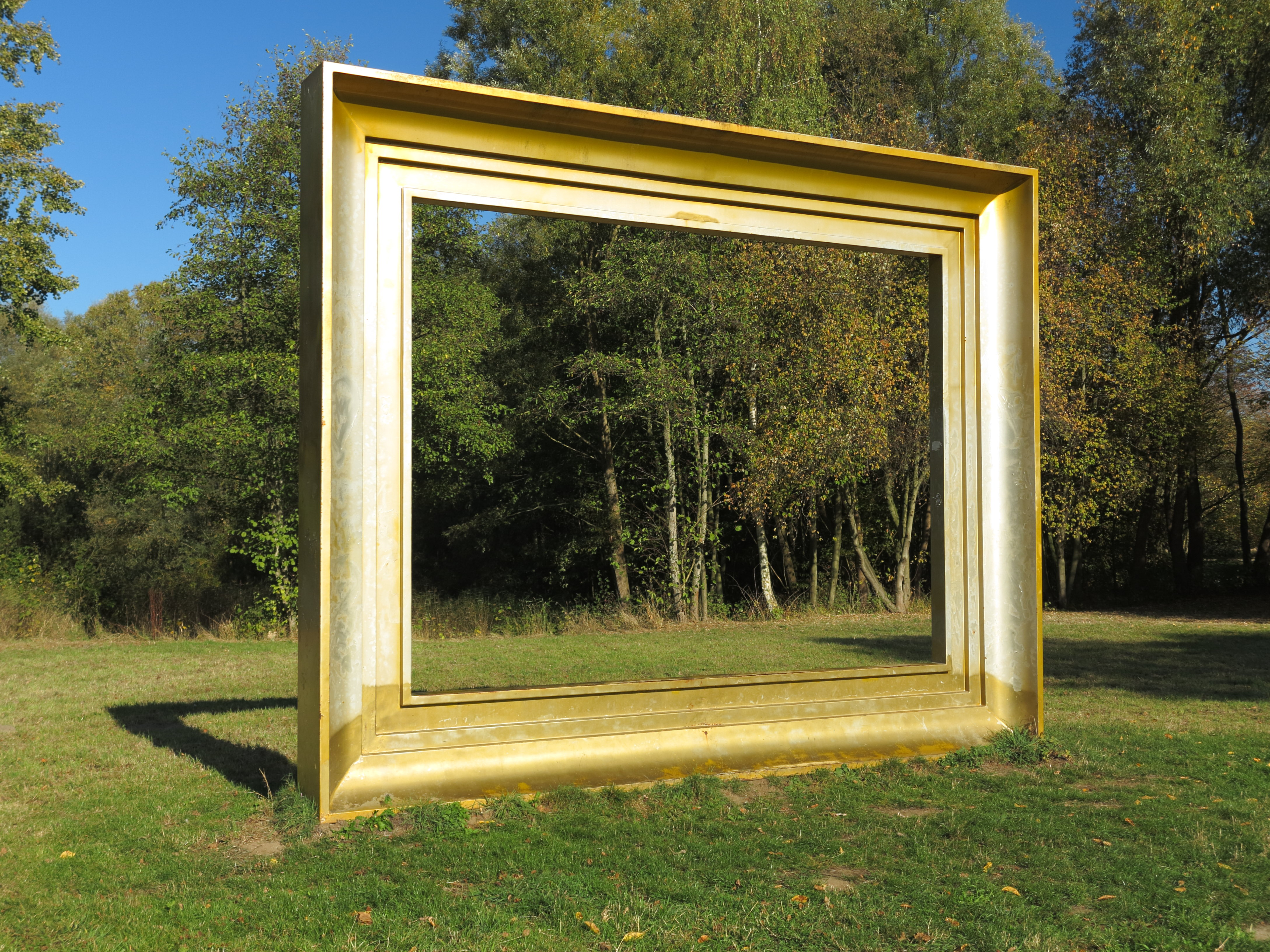 Die Skulptur "Der Bilderrahmen" von Jörg Lange im Braunschweiger Westpark aus dem Jahr 1990